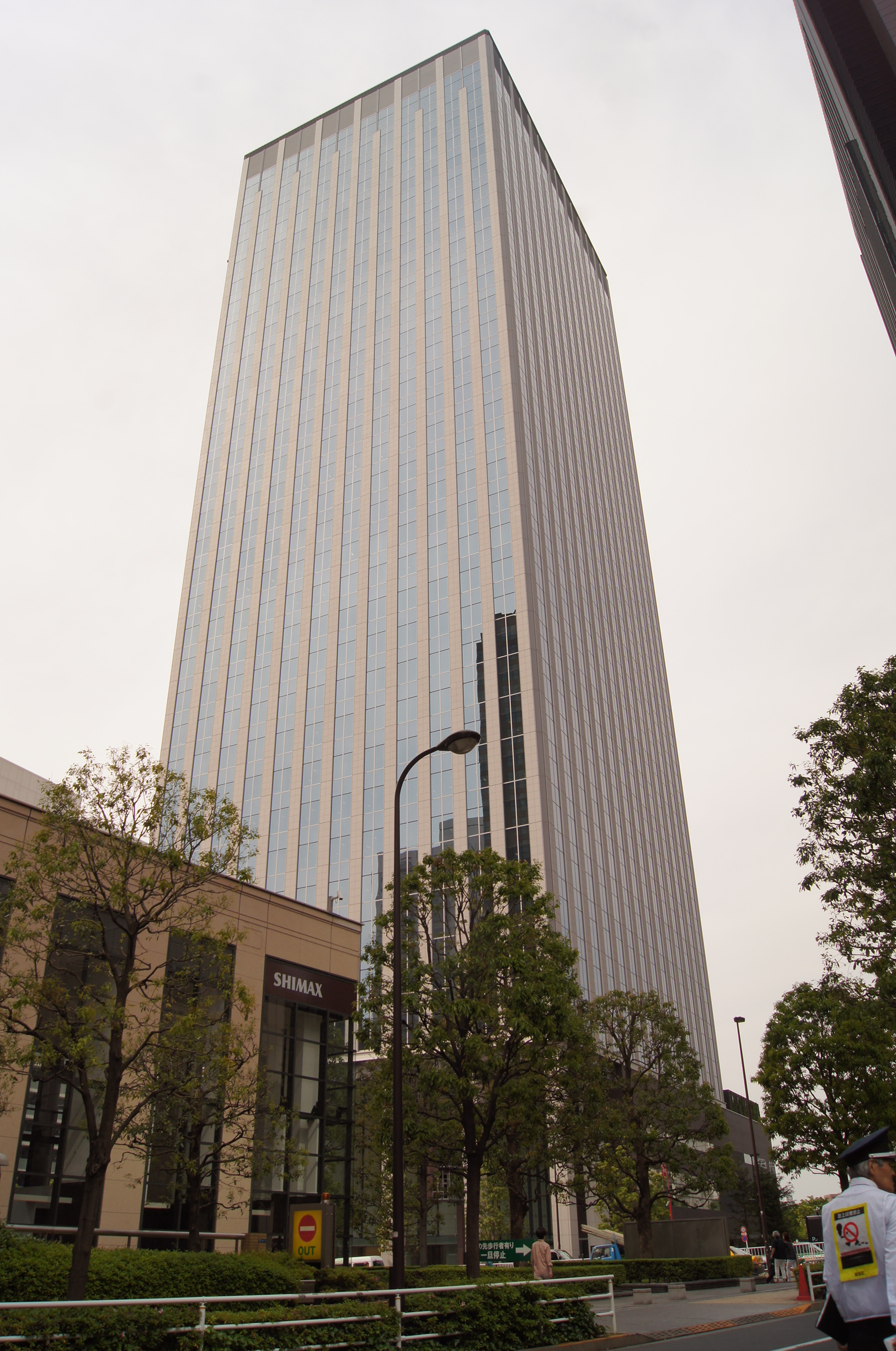 新宿フロントタワーを、建築中の東京栄養学校（丸山学園）工事ゲート辺りから撮影した。右端を歩いているのは、路上喫煙者を取り締まる区の臨時職員